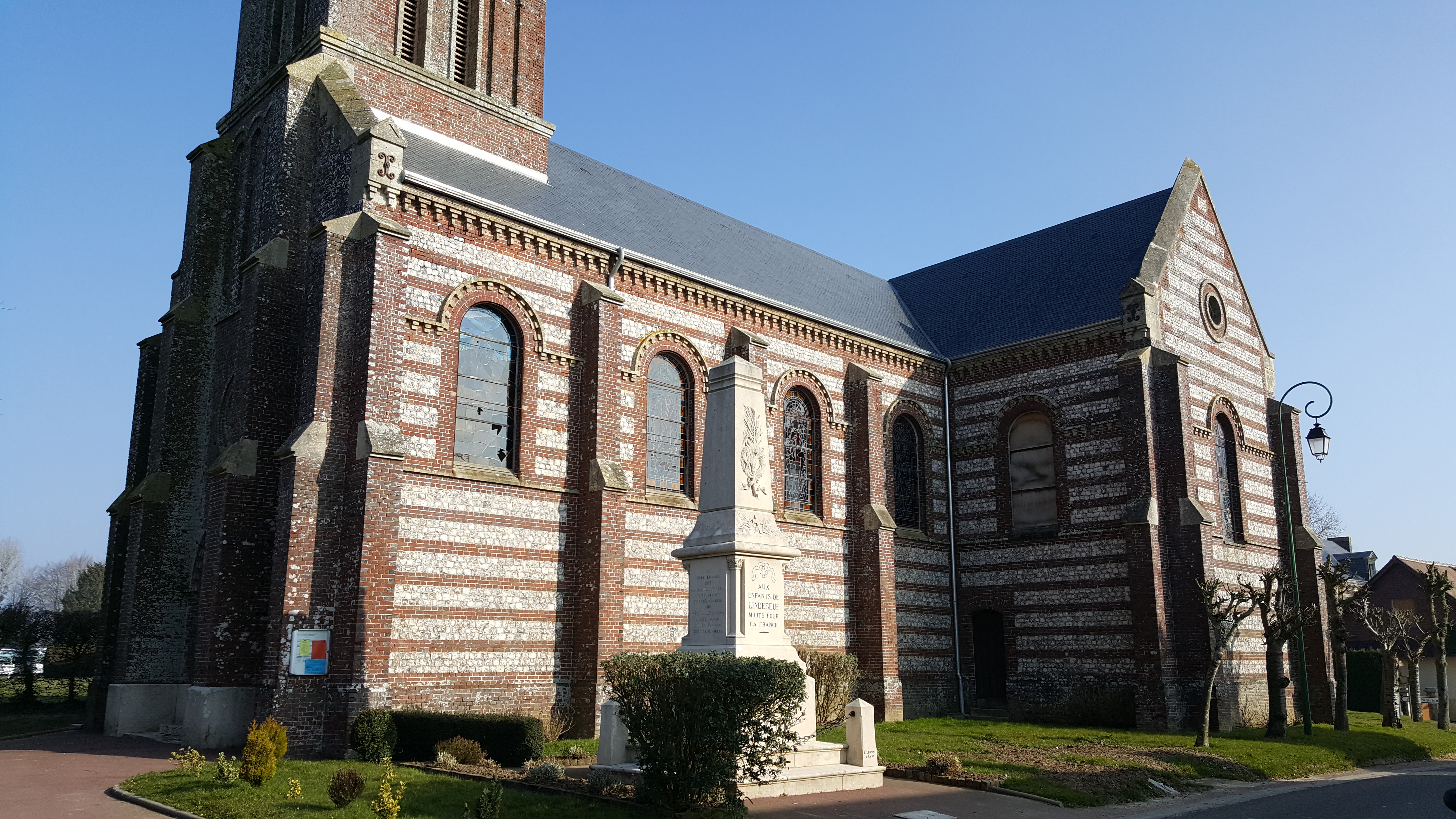 Eglise de Lindebeuf vue de la route